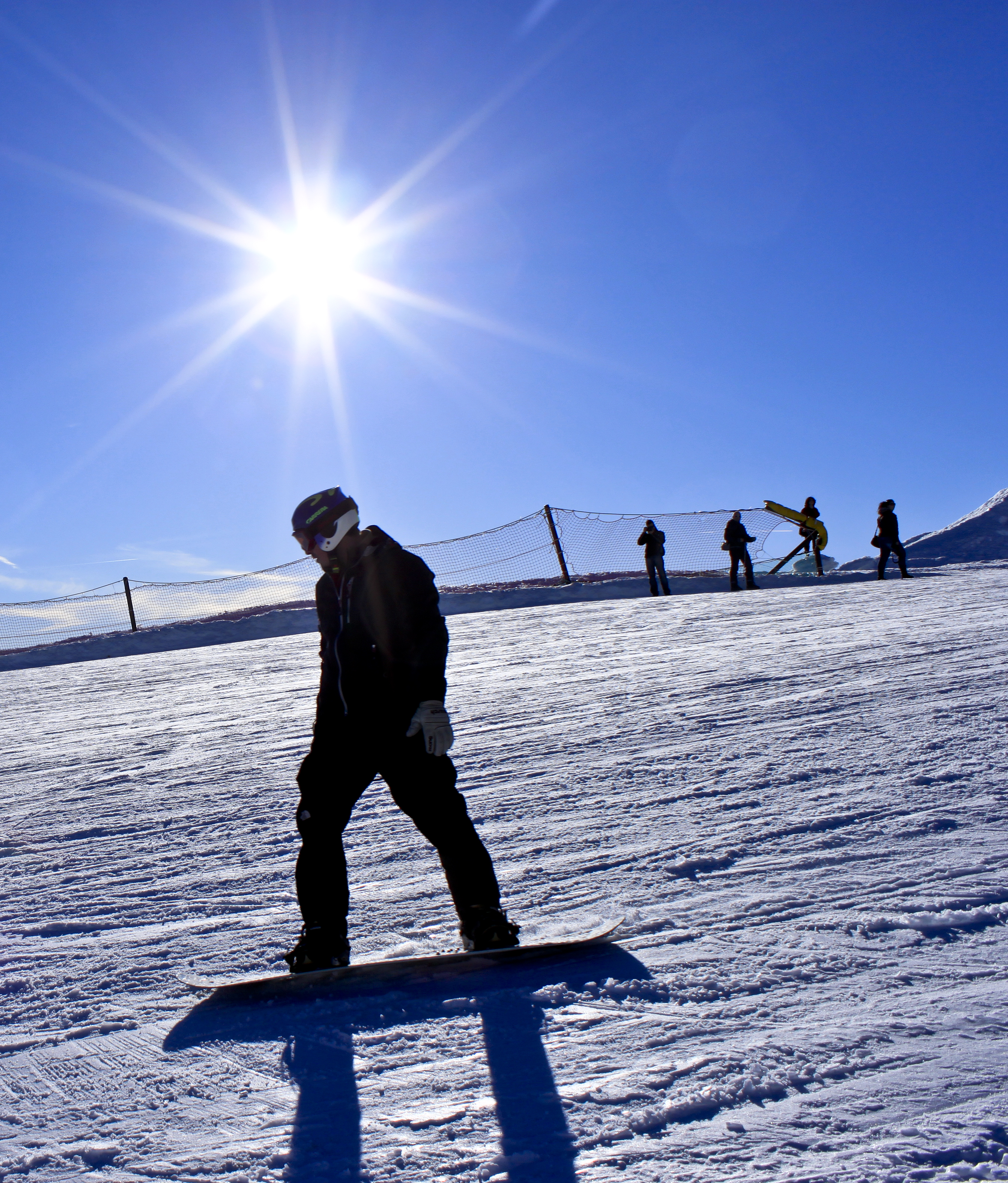 Fotografia di Gabriele Altimari